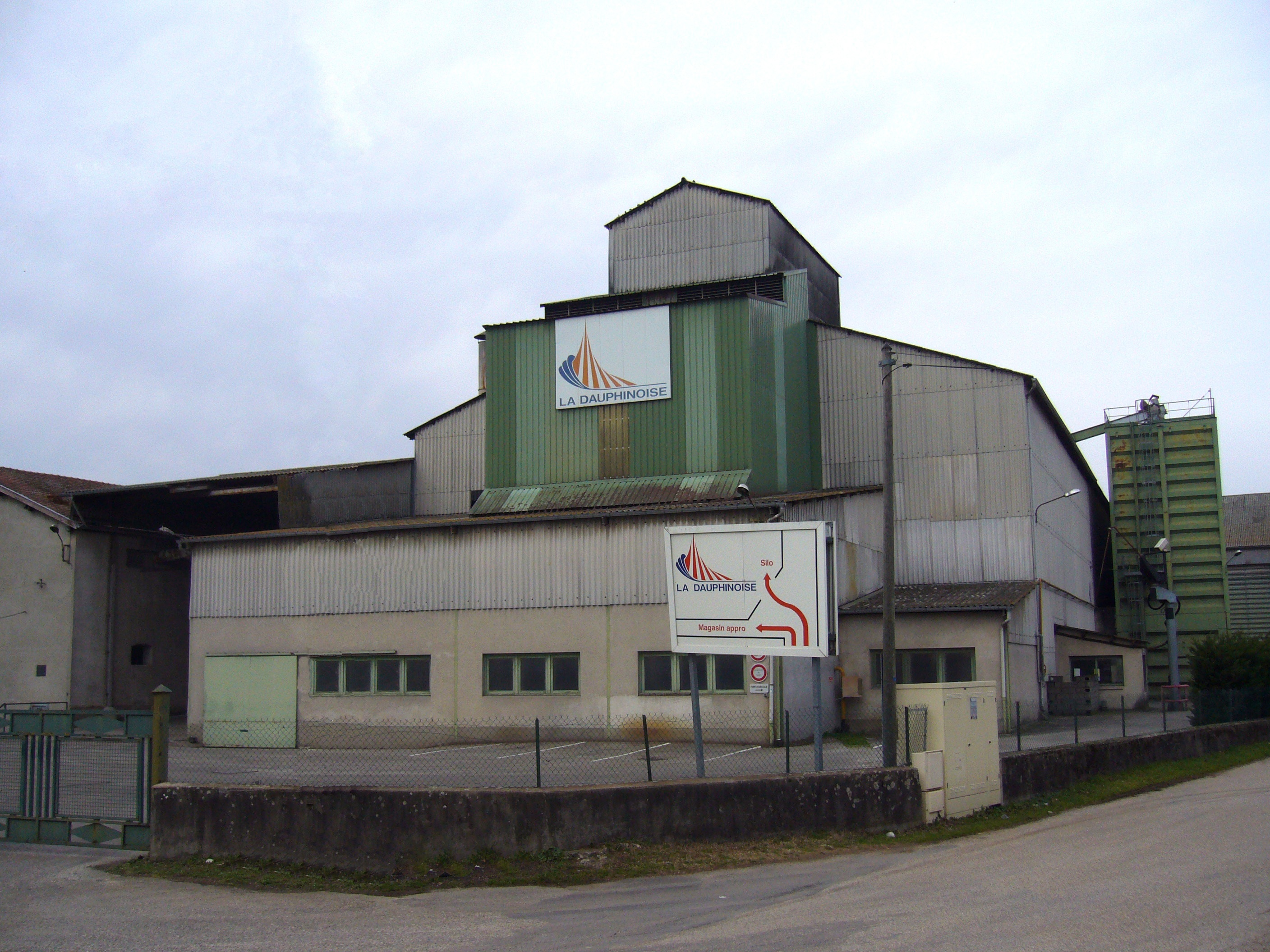 Installations de stockage de grains de la société La Dauphinoise, La Craz, Estrablin (38), France. Février 2007, Photo D.Etienne.